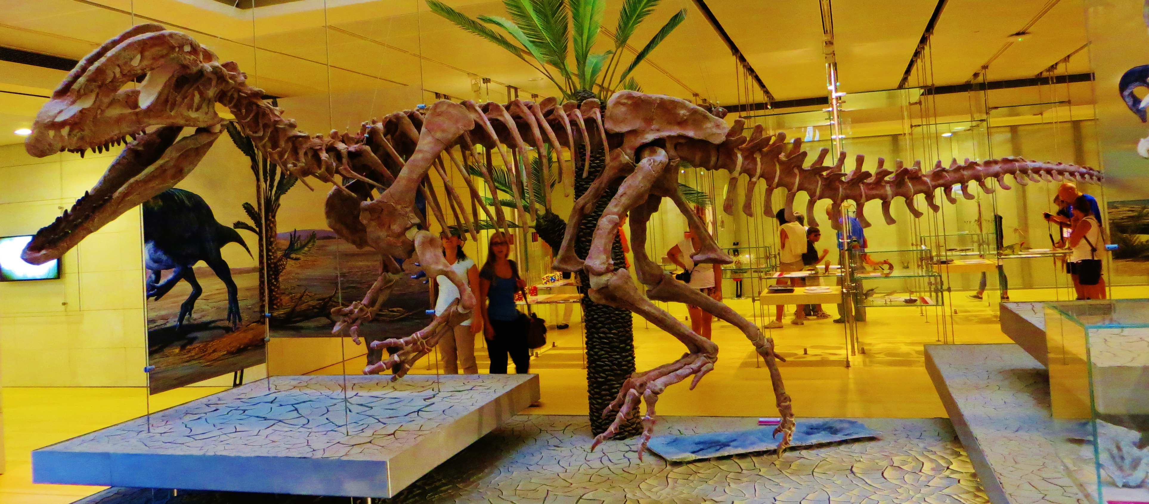 Fossil of Sinosaurus, an extinct reptile- Took the picture at Muse (Trento)